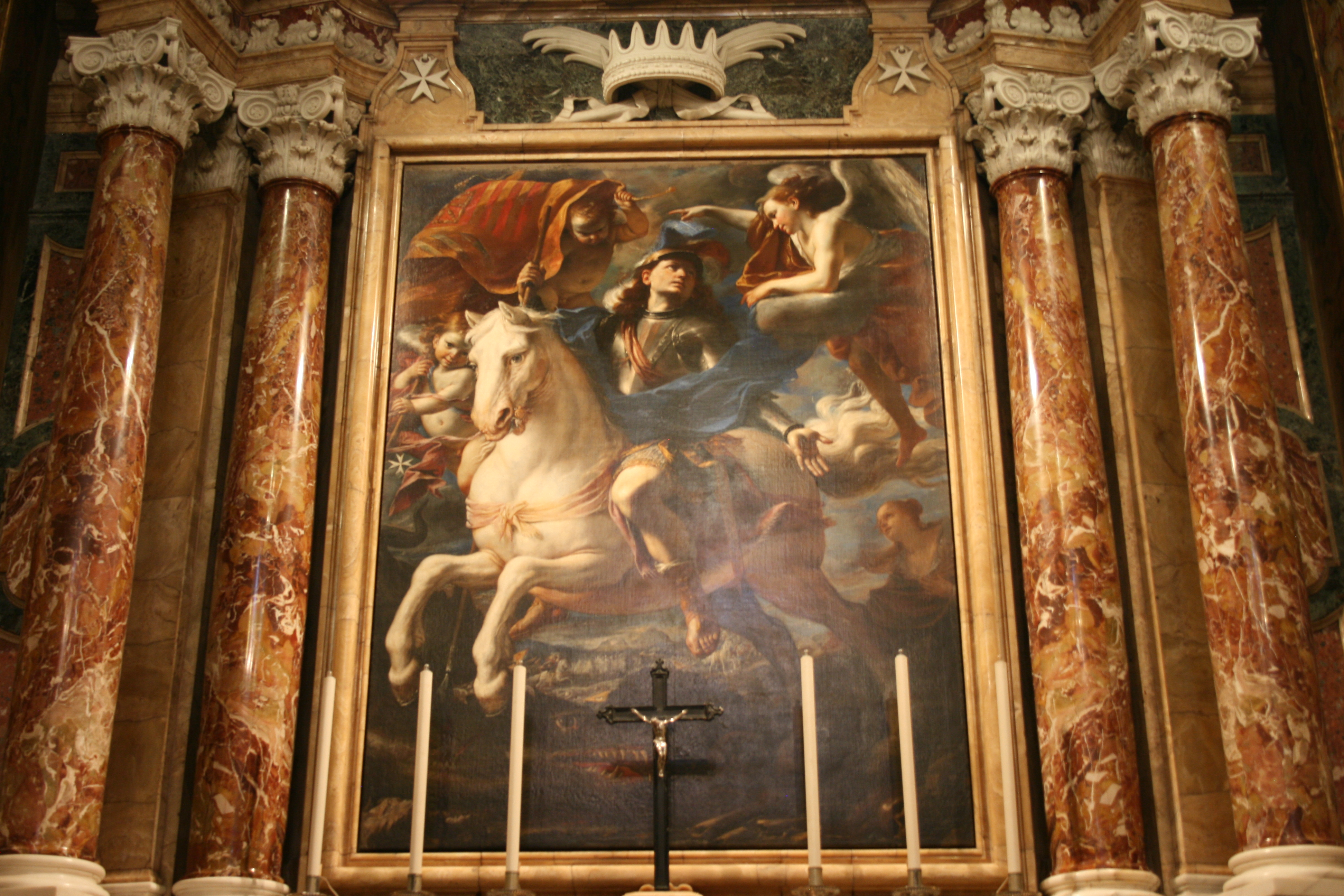 Darstellung von Georg von Mattia Preti